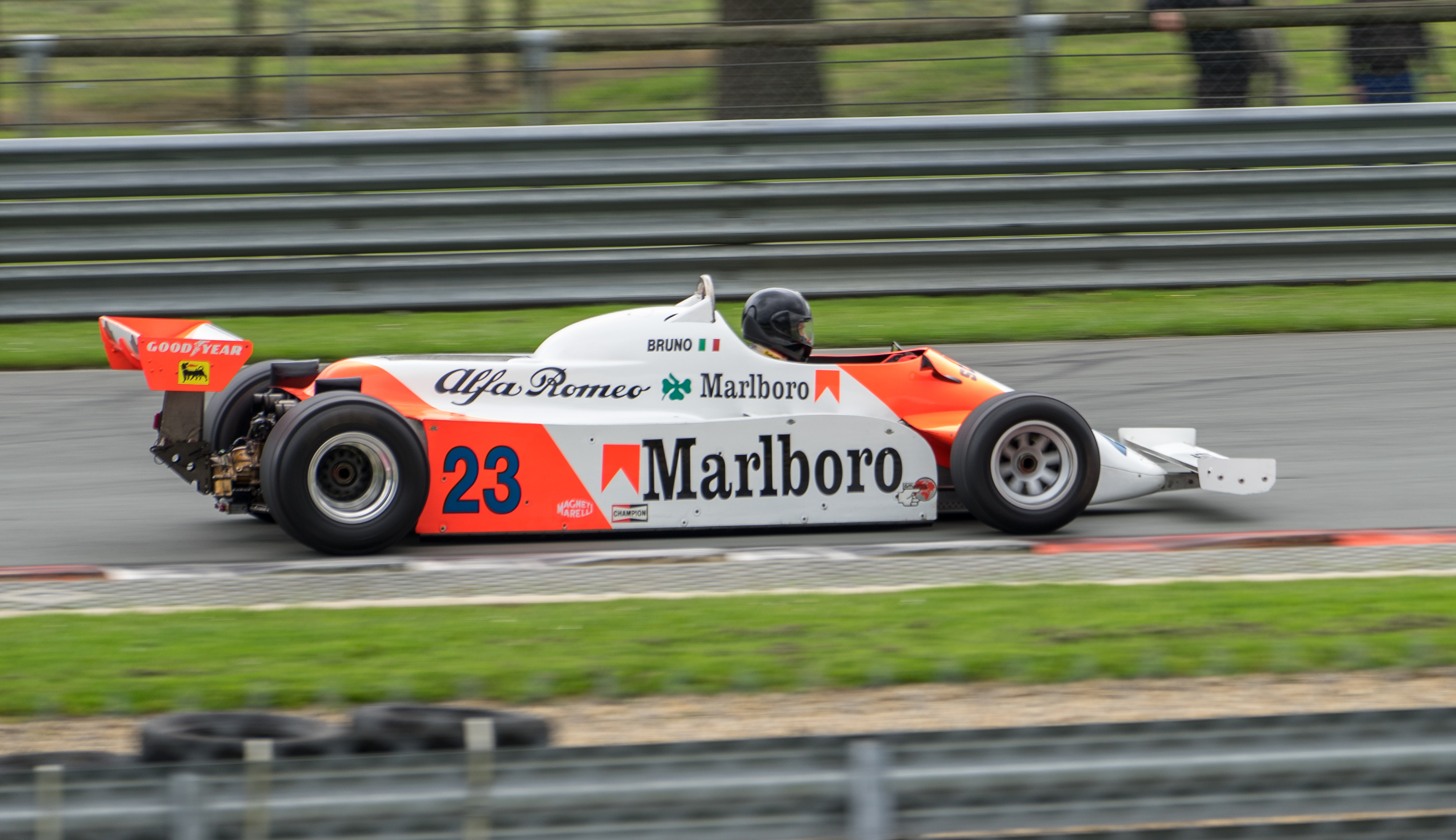 Alfa Romeo F1 Monocoque en alu 600kg V12 3.0 Alfa 1260 540cv a 1200tr/min 42 Giacomelli Team Marlboro Alfa : ANDRETTI Mario De CESARIS Andrea GIACOMELLI Bruno 22e Sport et Collection/500 Ferrari contre le cancer 2016